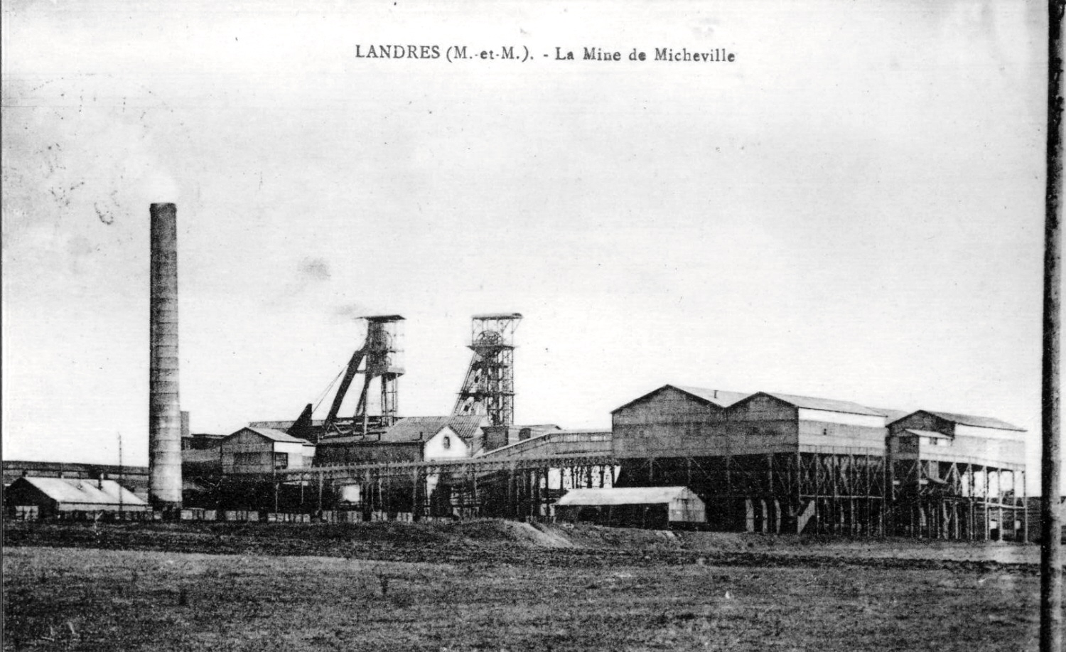 Landres : Mine (aujourd'hui détruite)